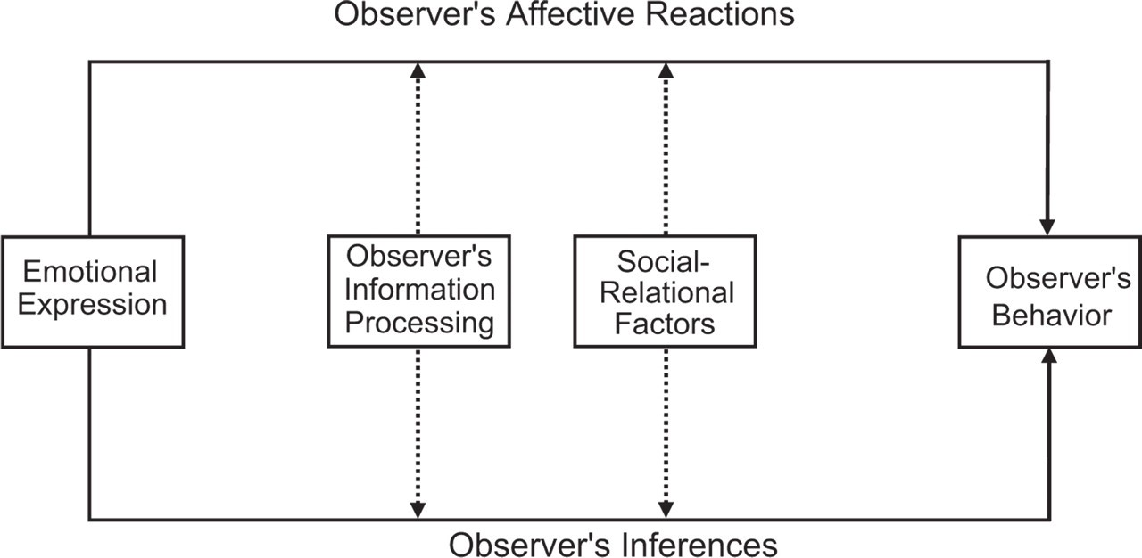 תיאור המודל